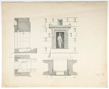 پلان کعبه زرتشت